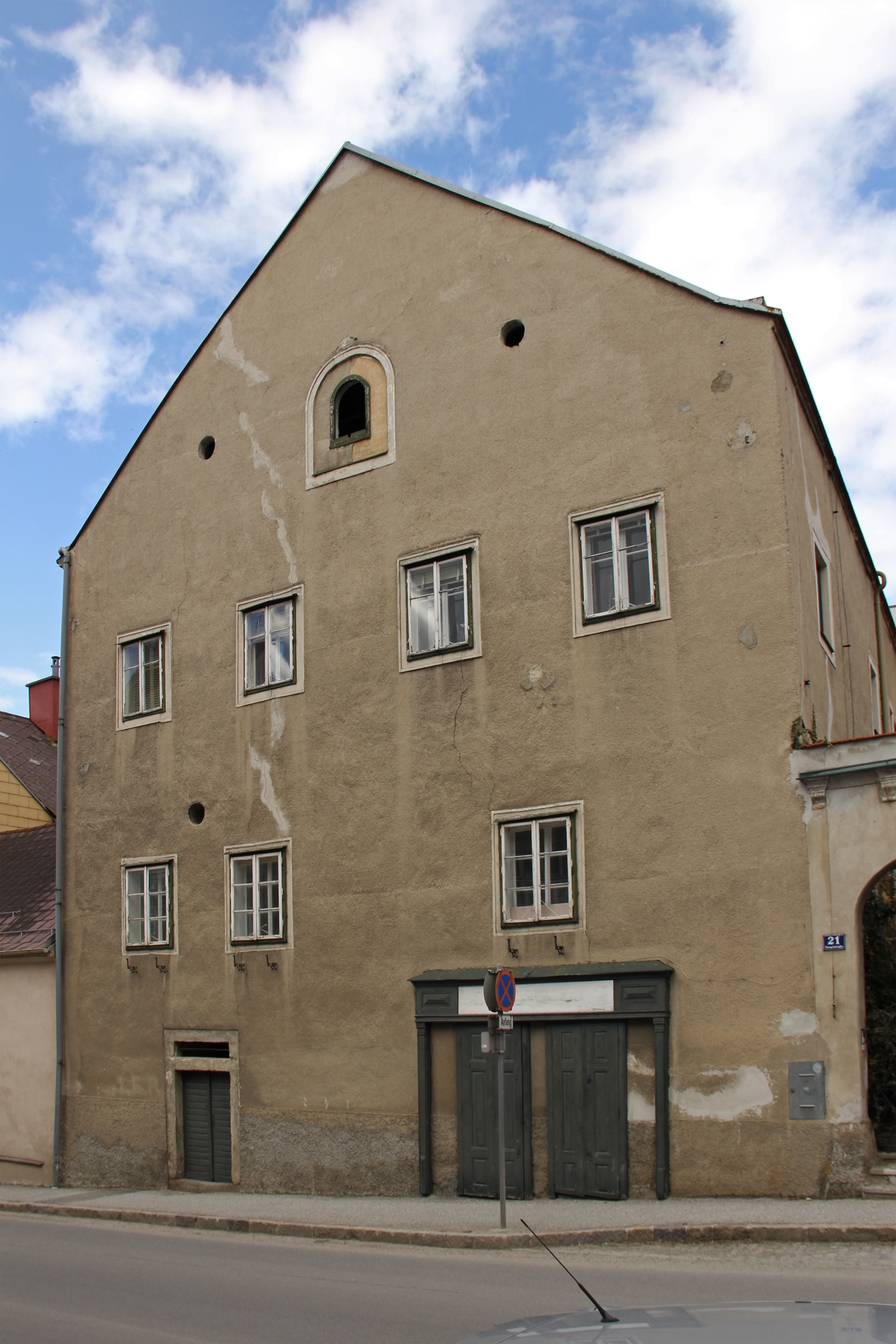 Der ehemalige Freihof der Familie Hager ist ein giebelständiger Bau mit drei Geschoßen. Er stammt im Kern aus dem 16. Jahrhundert.